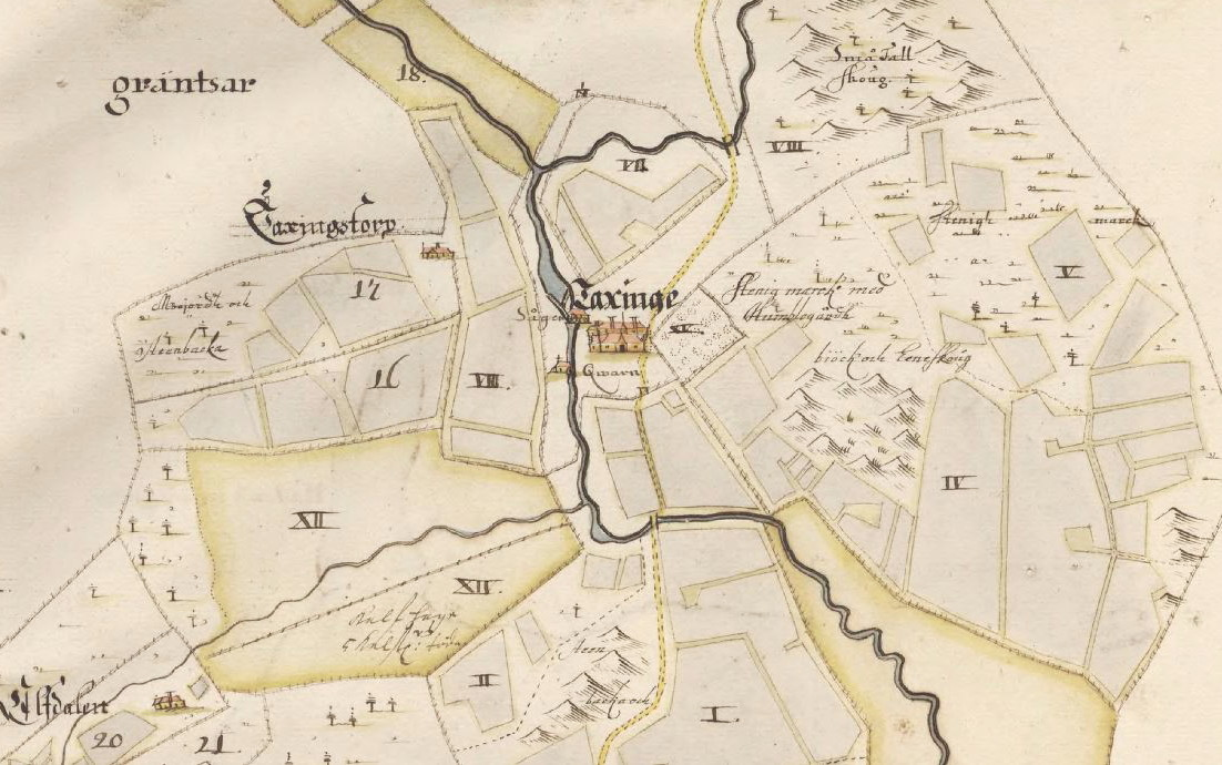 Del av karta över Taxinge ägor